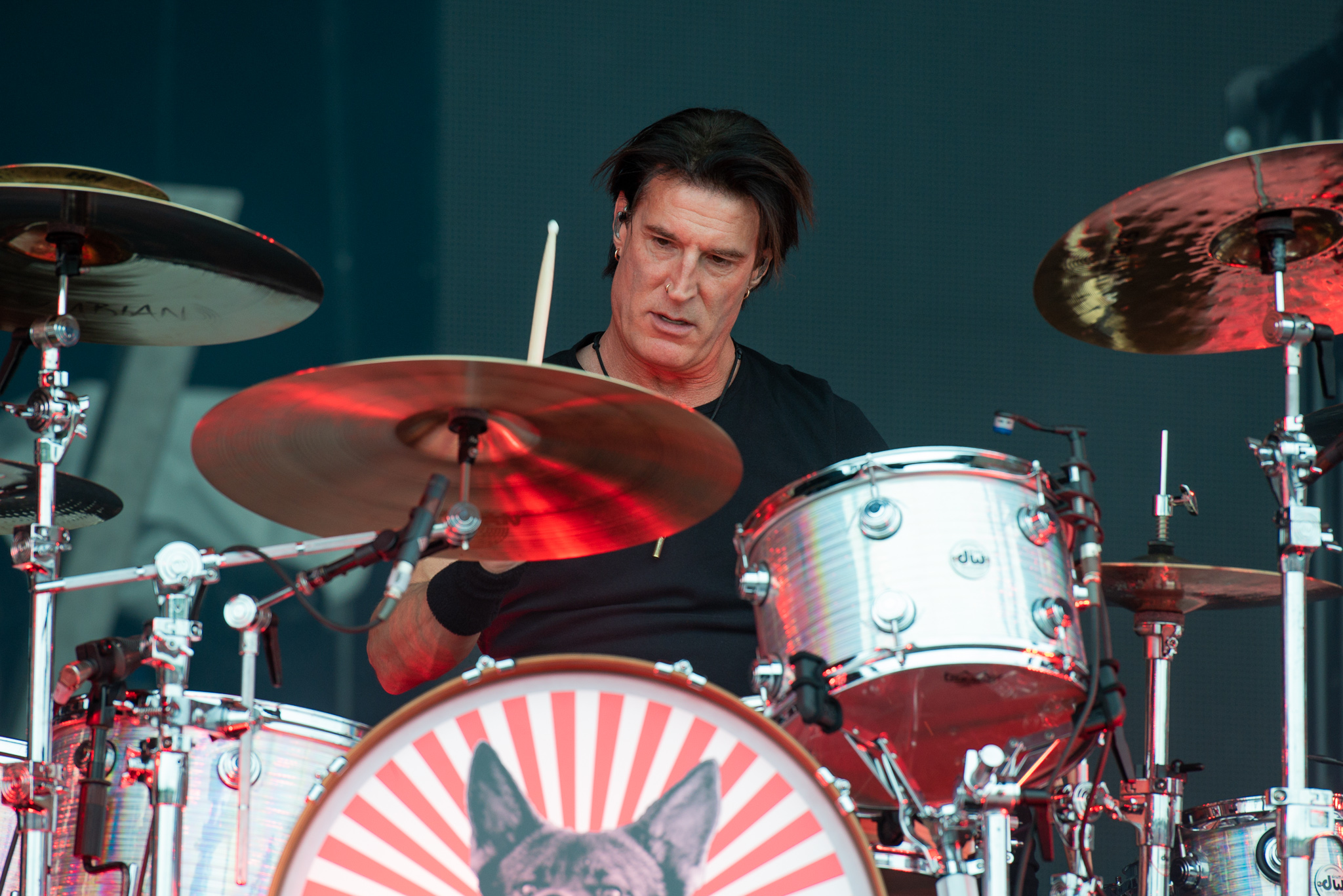 ARGO-Konzerte,Alice in Chains,Konzert,Livekonzert,Livemusik,Musik,RiP,Rock im Park 2019,Sean Kinney,Zeppelin Stage